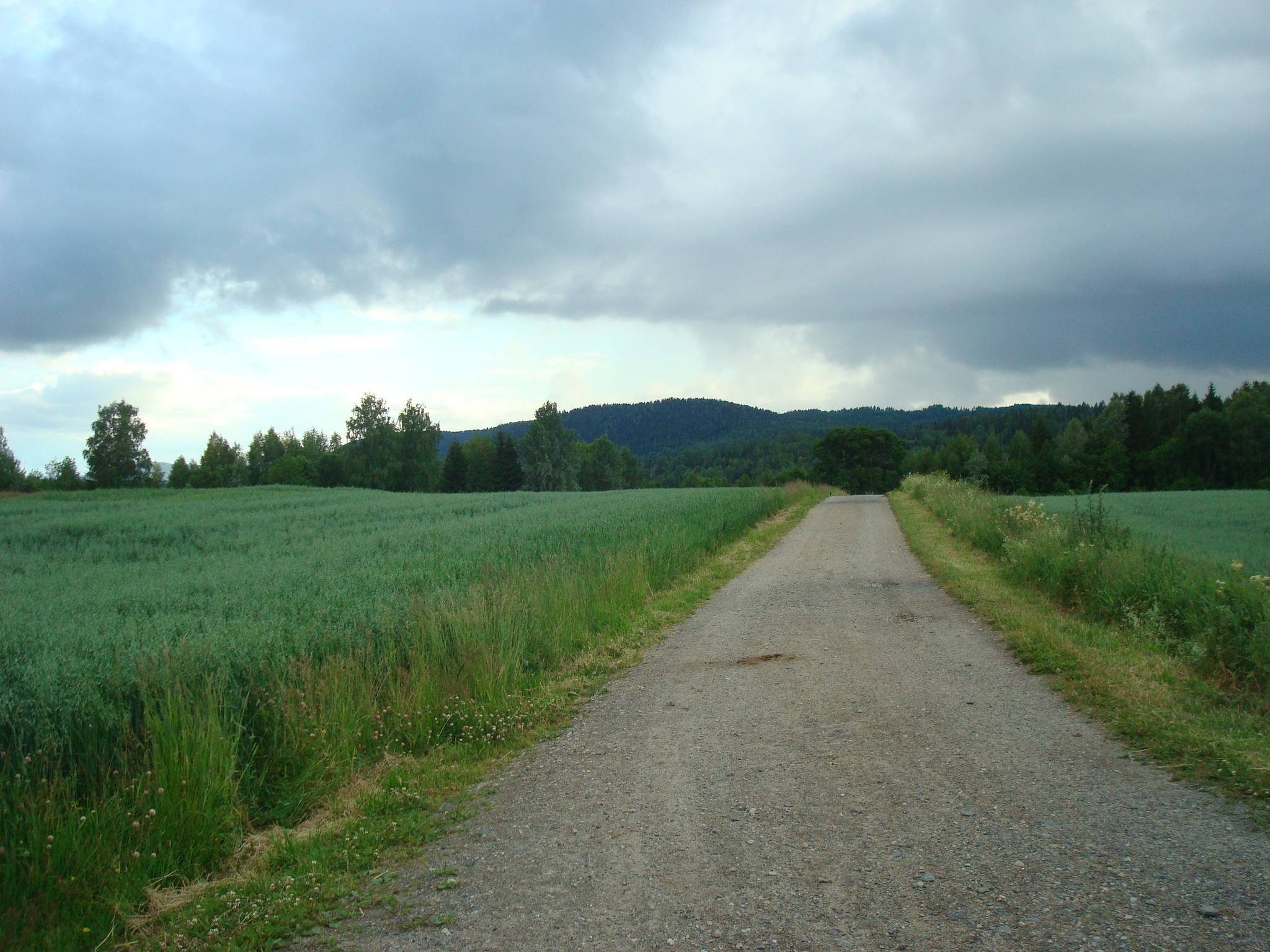 Parti fra Ankerveien ved Grini, sett fra krysset Østernvannveien.